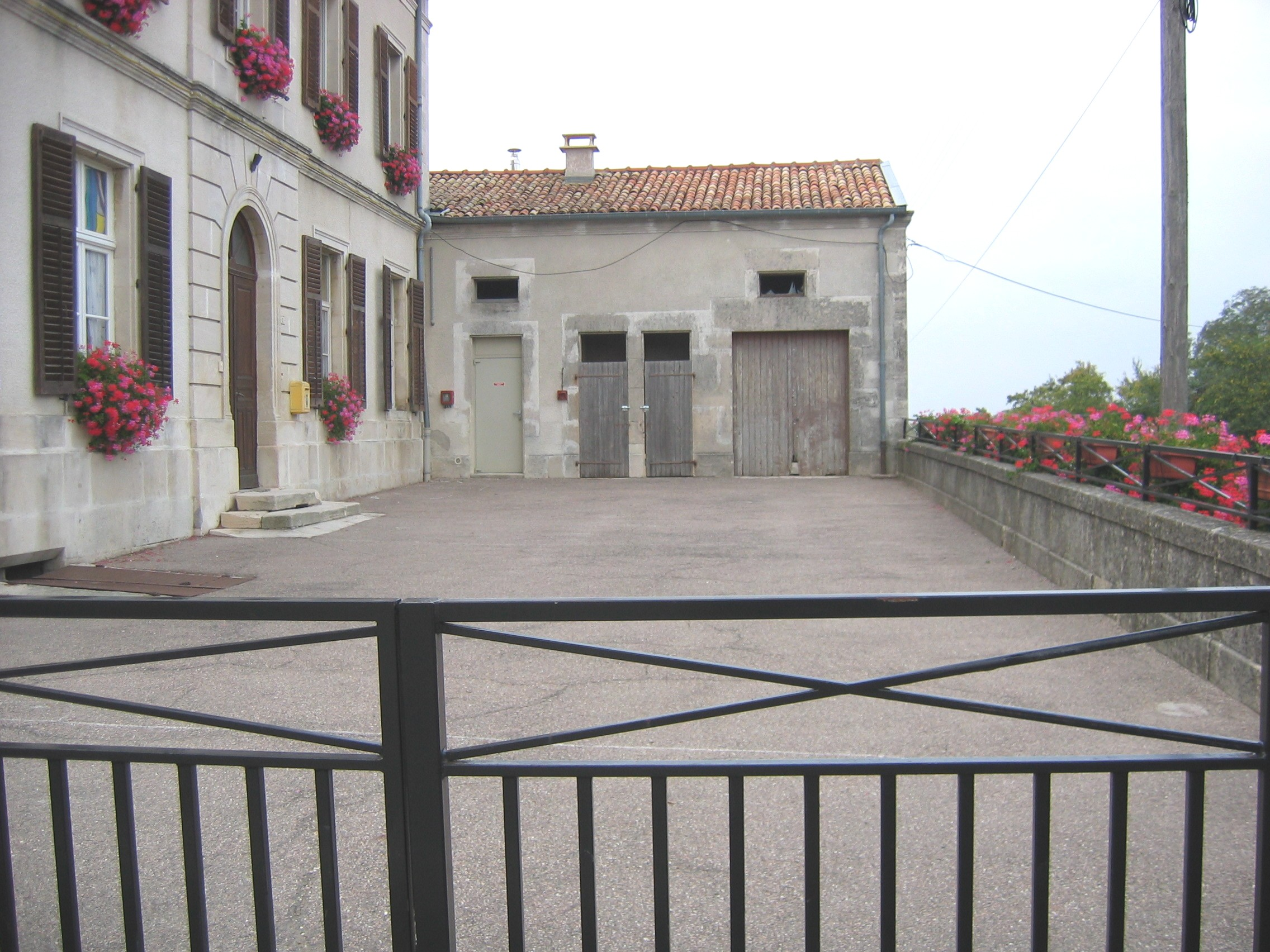 Broussey-Raulecourt-55-Cour de l'école avec les toilettes d'époque au fond